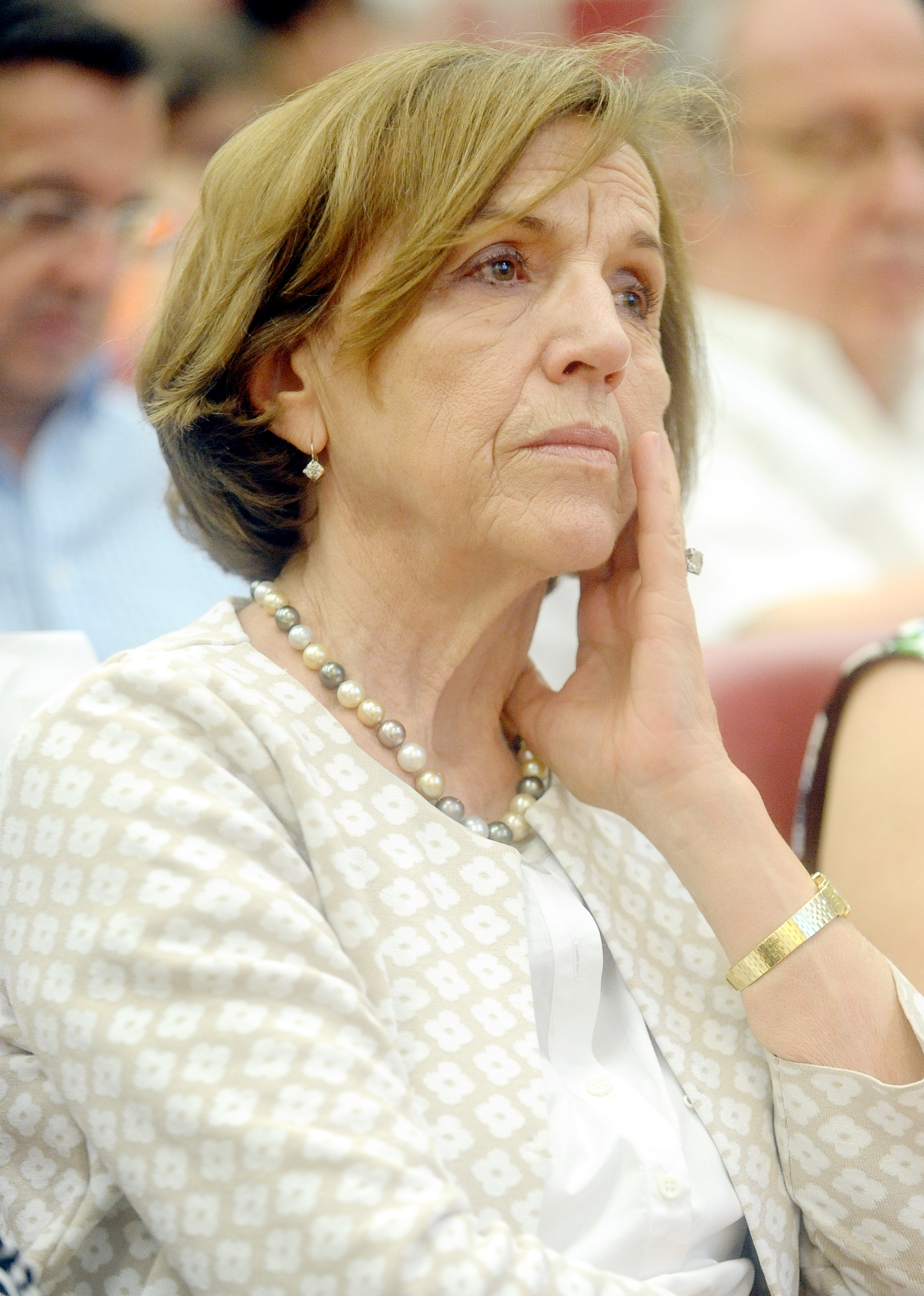 Elsa Fornero al Festival dell'Economia di Trento.